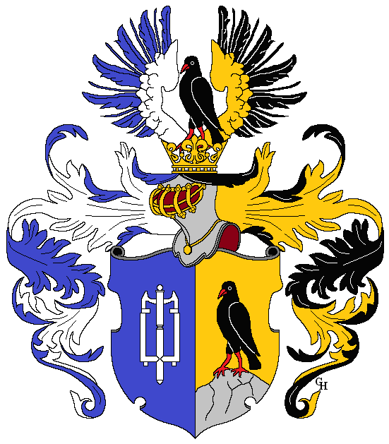 Wappen des tschechisch-österreichischen Unternehmers Franz Preidl (1810–1889), verliehen anlässlich seiner Erhebung in den österreichischen Adelsstand als "Edler von Hassenbrunn" 1887. Zeichnung von Gerd Hruška ( Für weitere Informationen zu dieser Standeserhebung siehe (